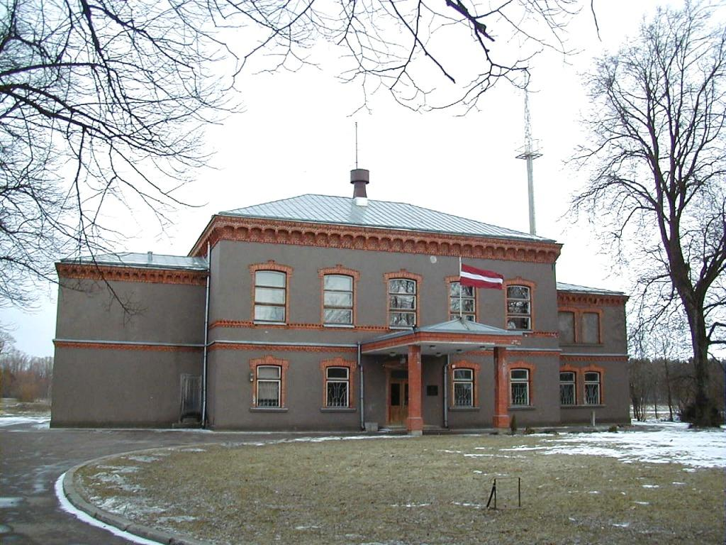 Ādažu pagastnams 2000-03-12